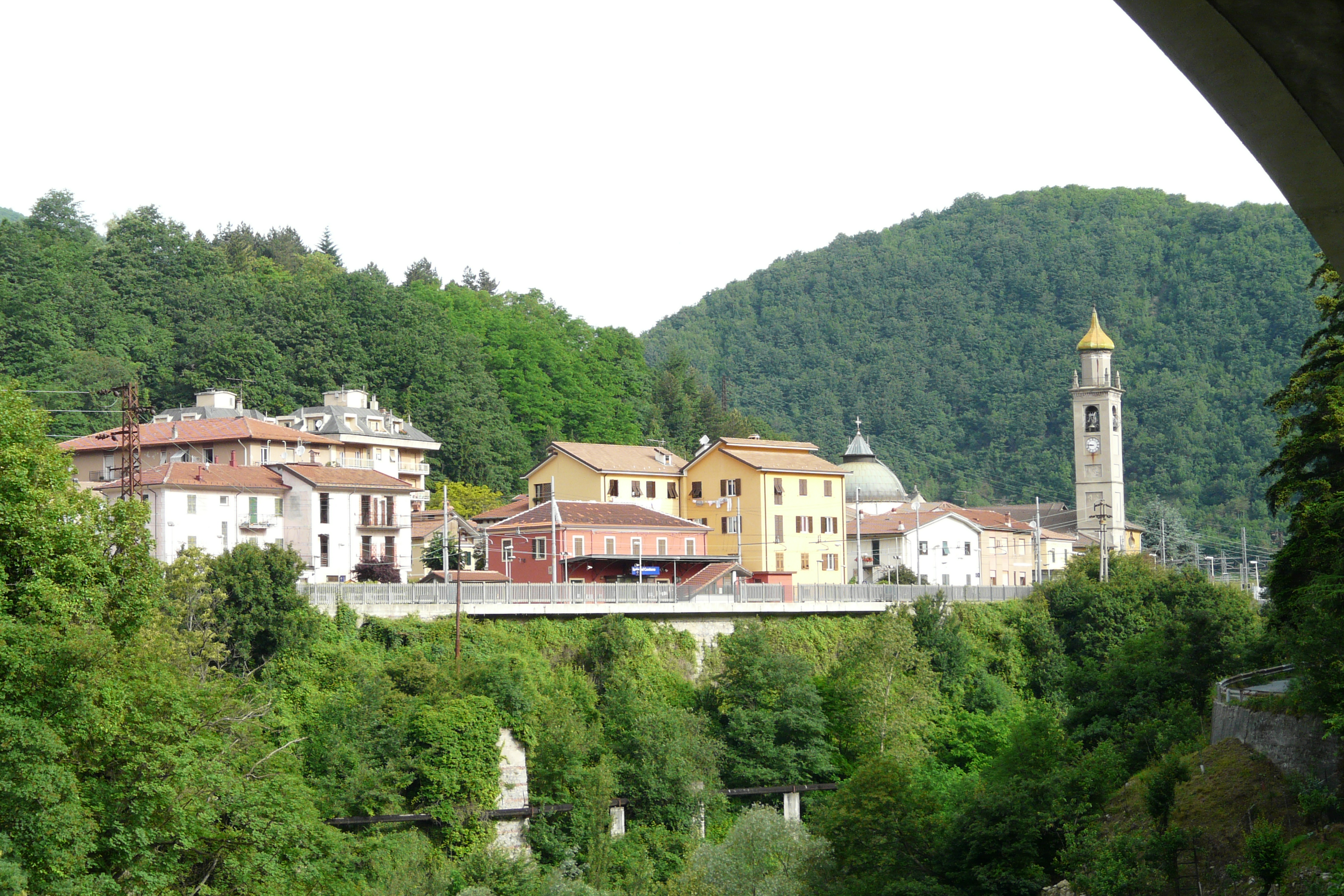 Panorama di Isola del Cantone. Sullo sfondo la stazione ferroviaria e a destra il campanile della chiesa di San Michele